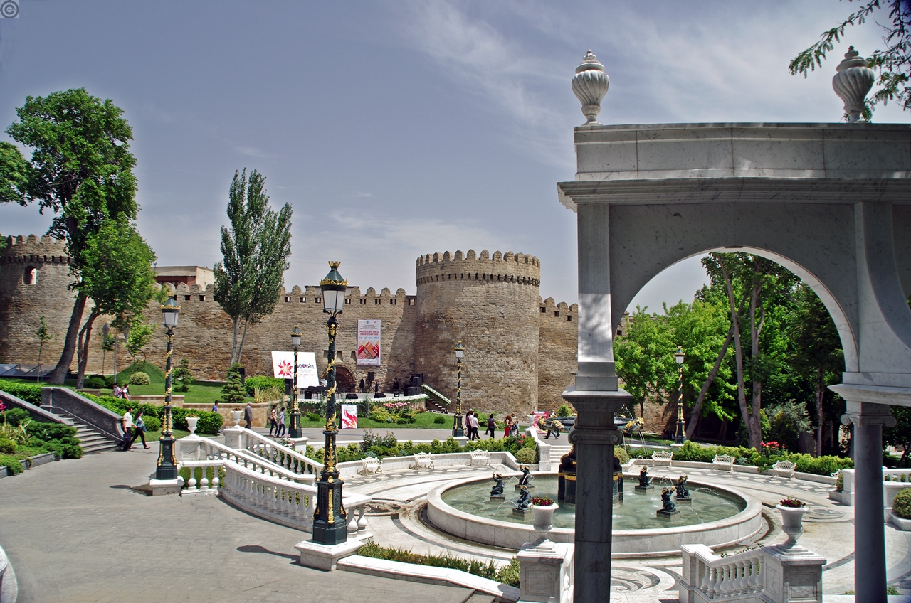 Bakı, keçmiş "Qubernator", indiki "Filarmoniya bağı"